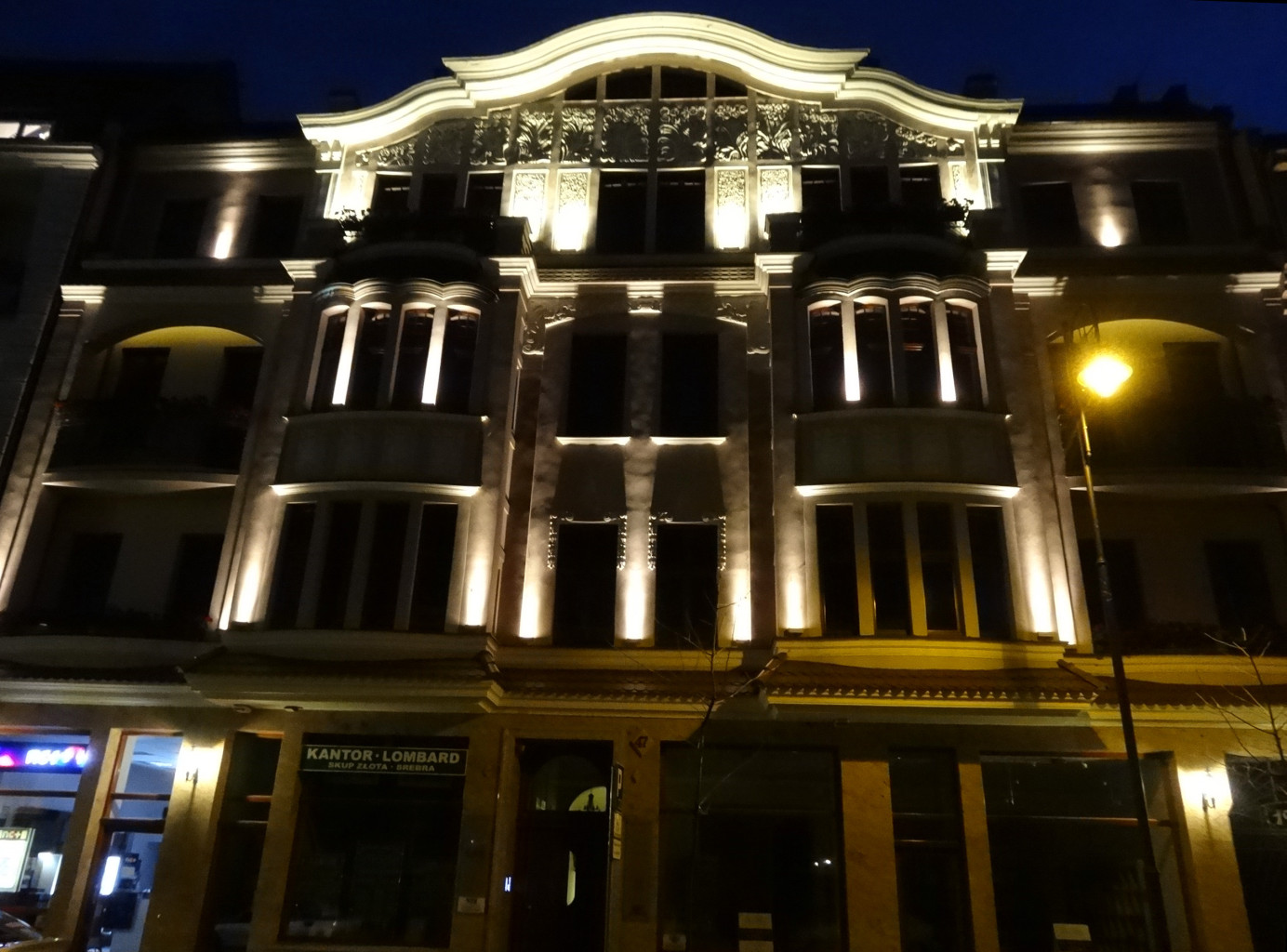 Kamienica przy ul. Dworcowej 47 w Bydgoszczy (1906, secesja)